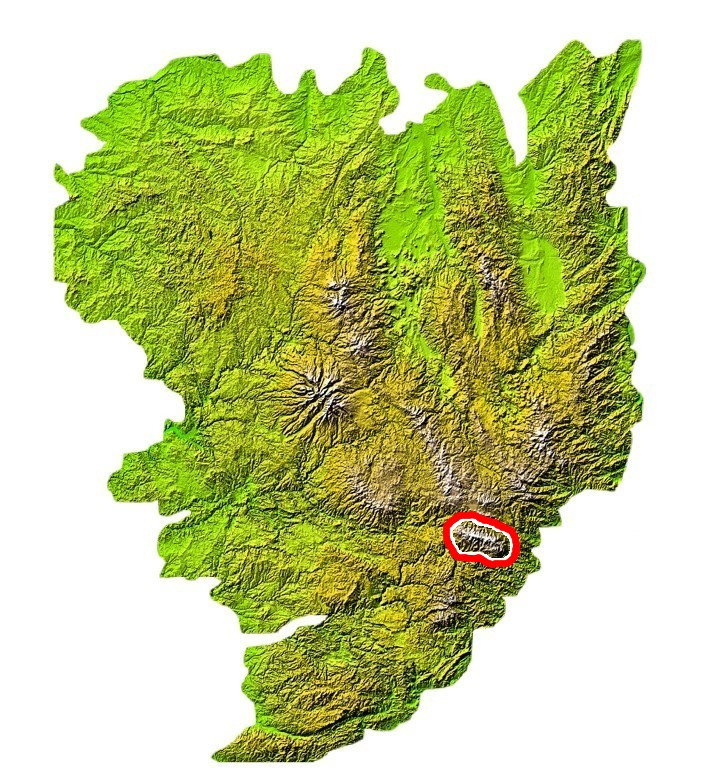 Situation du massif du mont Lozère sur la carte du Massif central